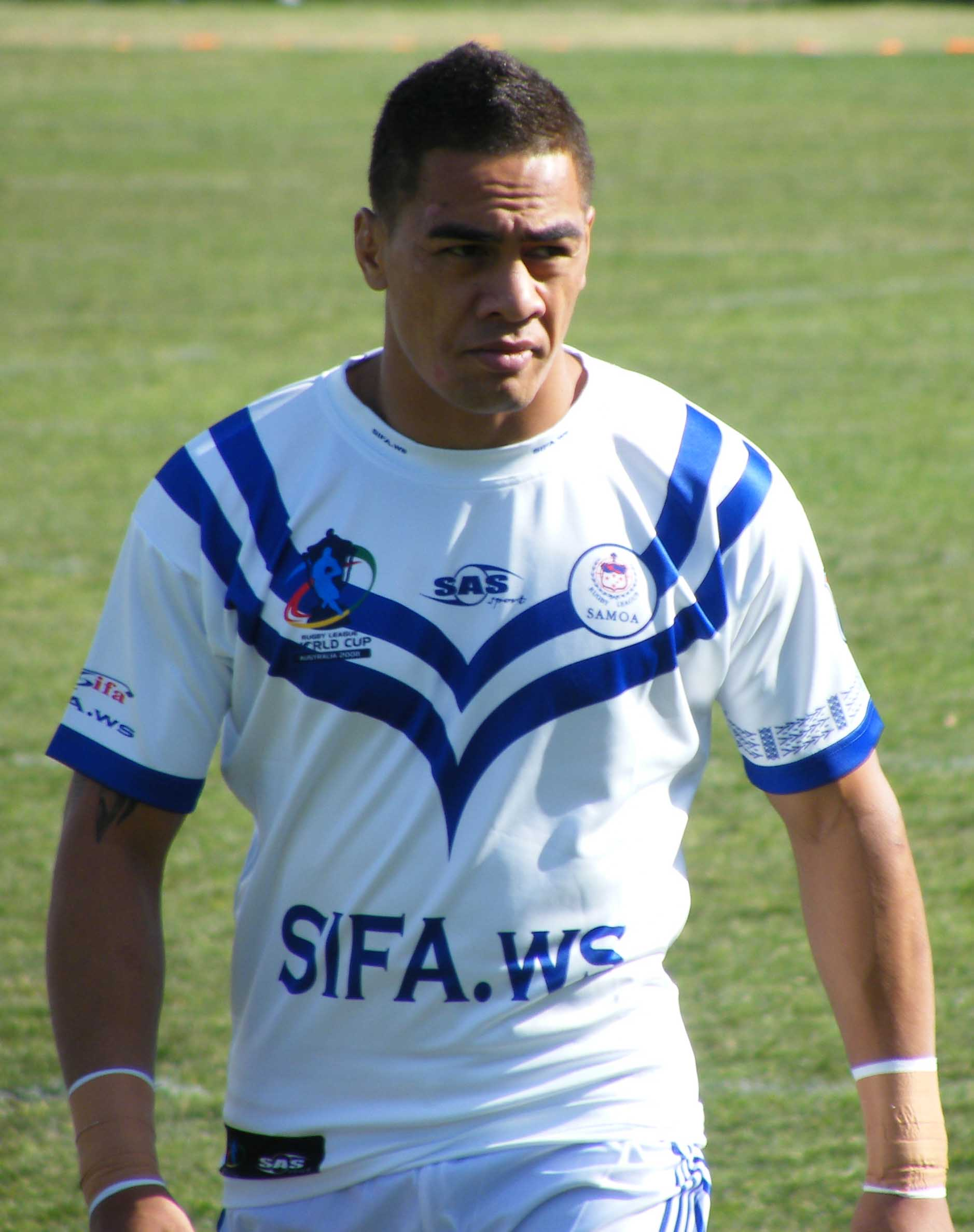 RLWC 2008 - Samoa v France at Penrith. Samoan Winger Misi Taulapapa.